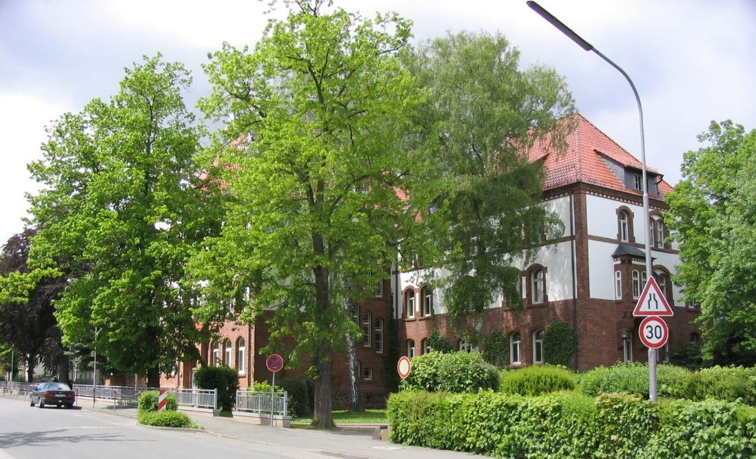 Edertalschule in Frankenberg/Eder an der Geismarer Straße